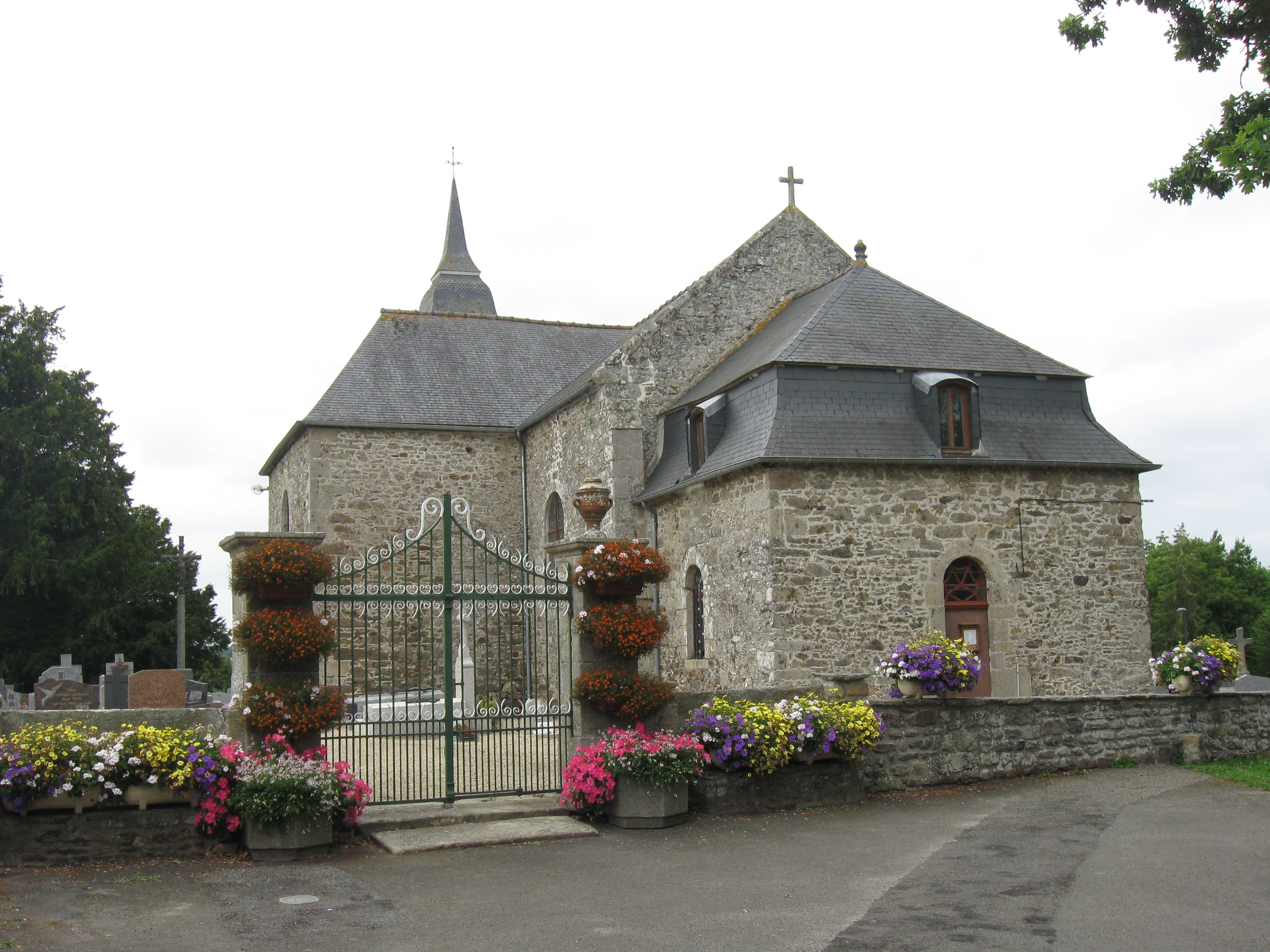 Église Saint-Pierre-et-Saint-Paul de Ruca. (Côtes-d'Armor, région Bretagne).